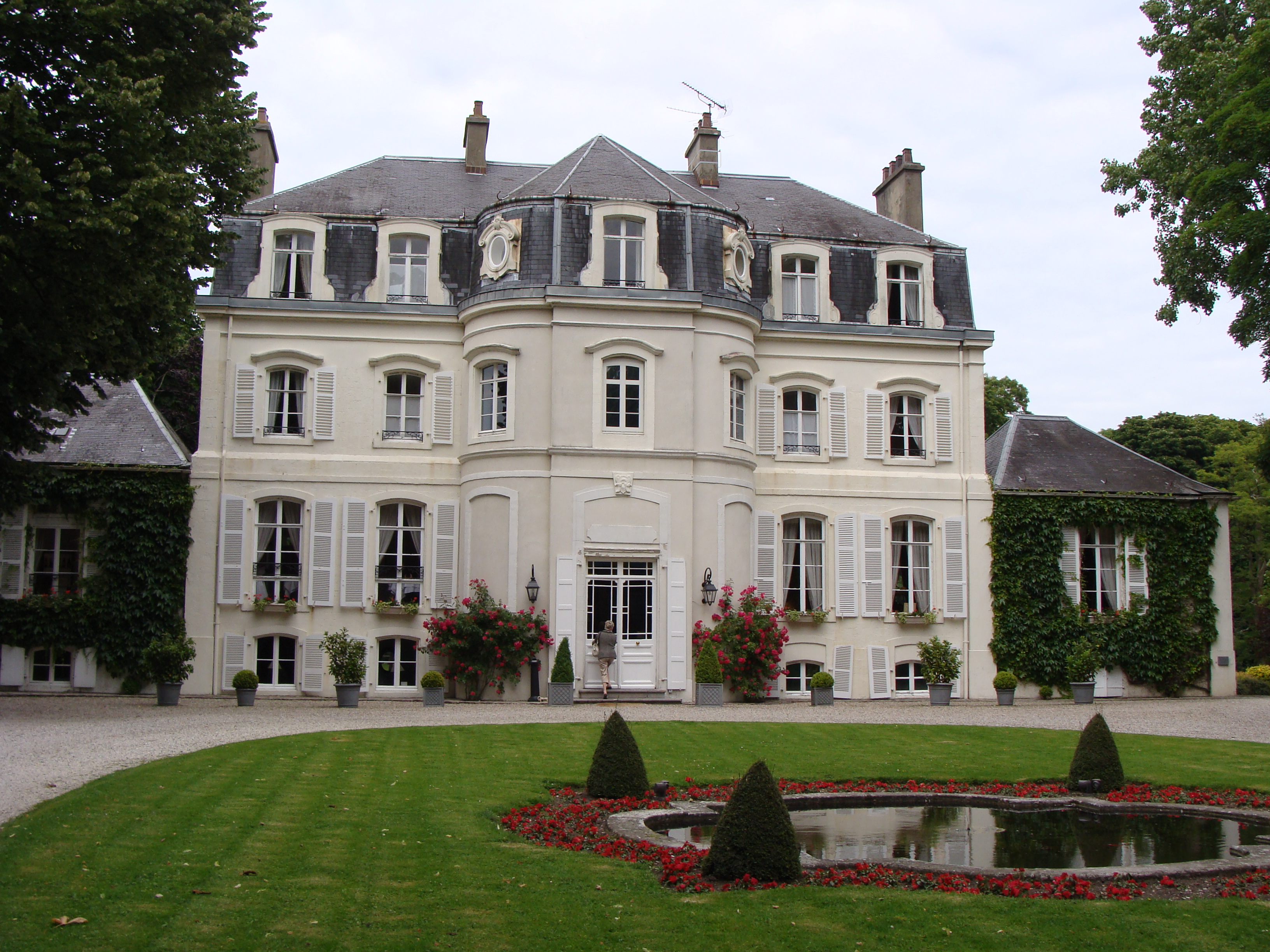 Château de Cléry à Hesdin-l'Abbé (France)